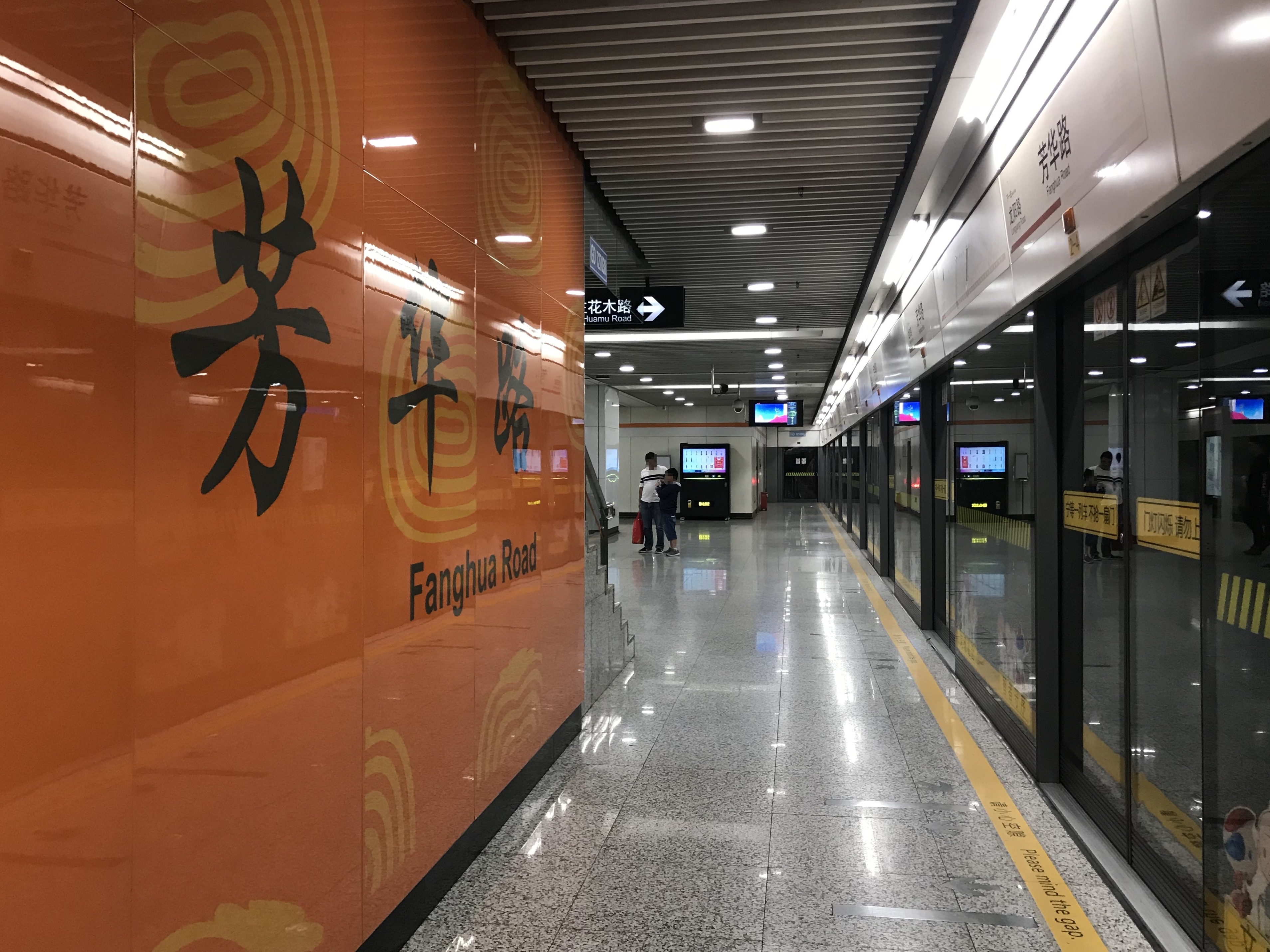 芳華路駅のホーム